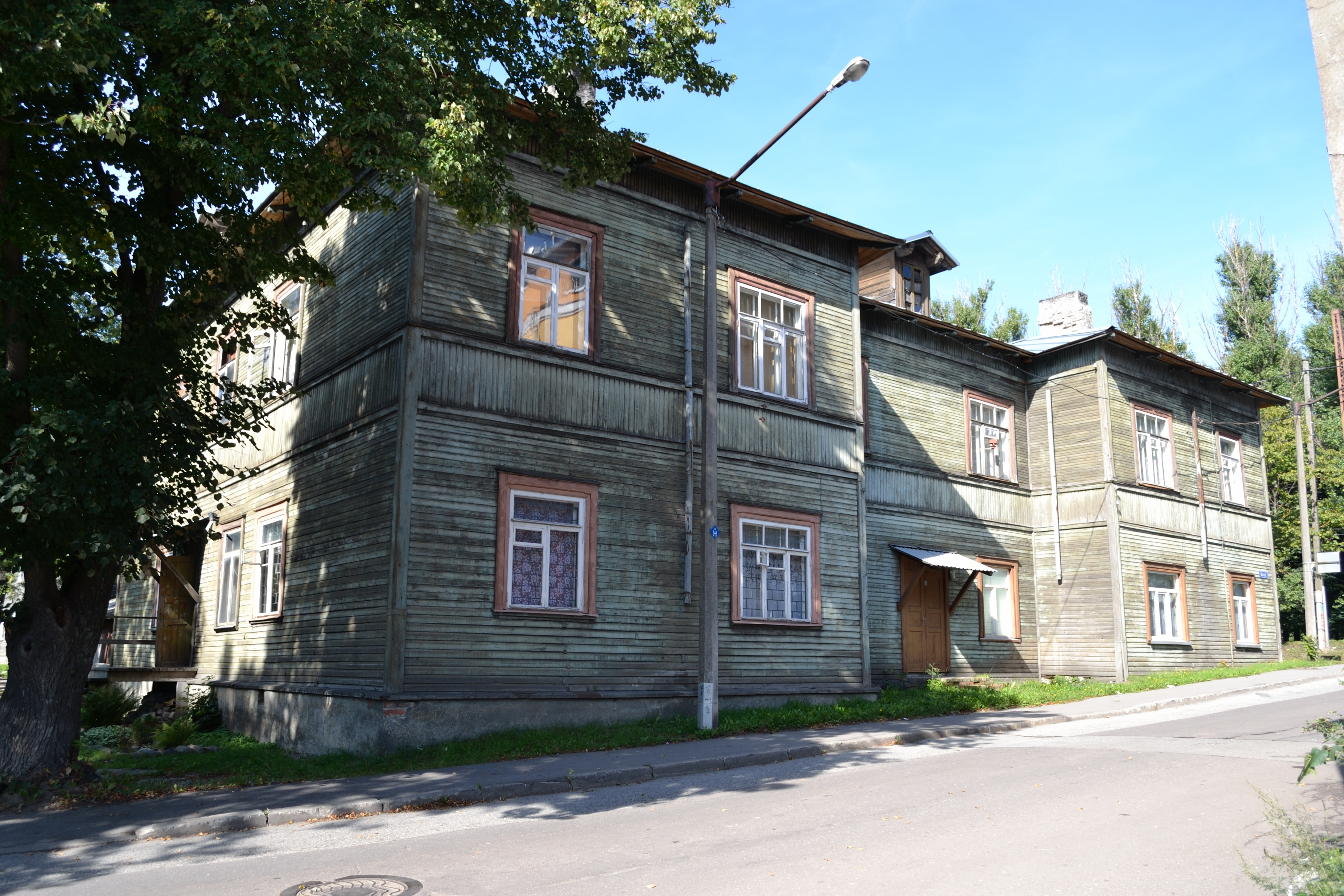 Tallinn, Bekkeri laevatehase politseijaoskond, 1912-1916